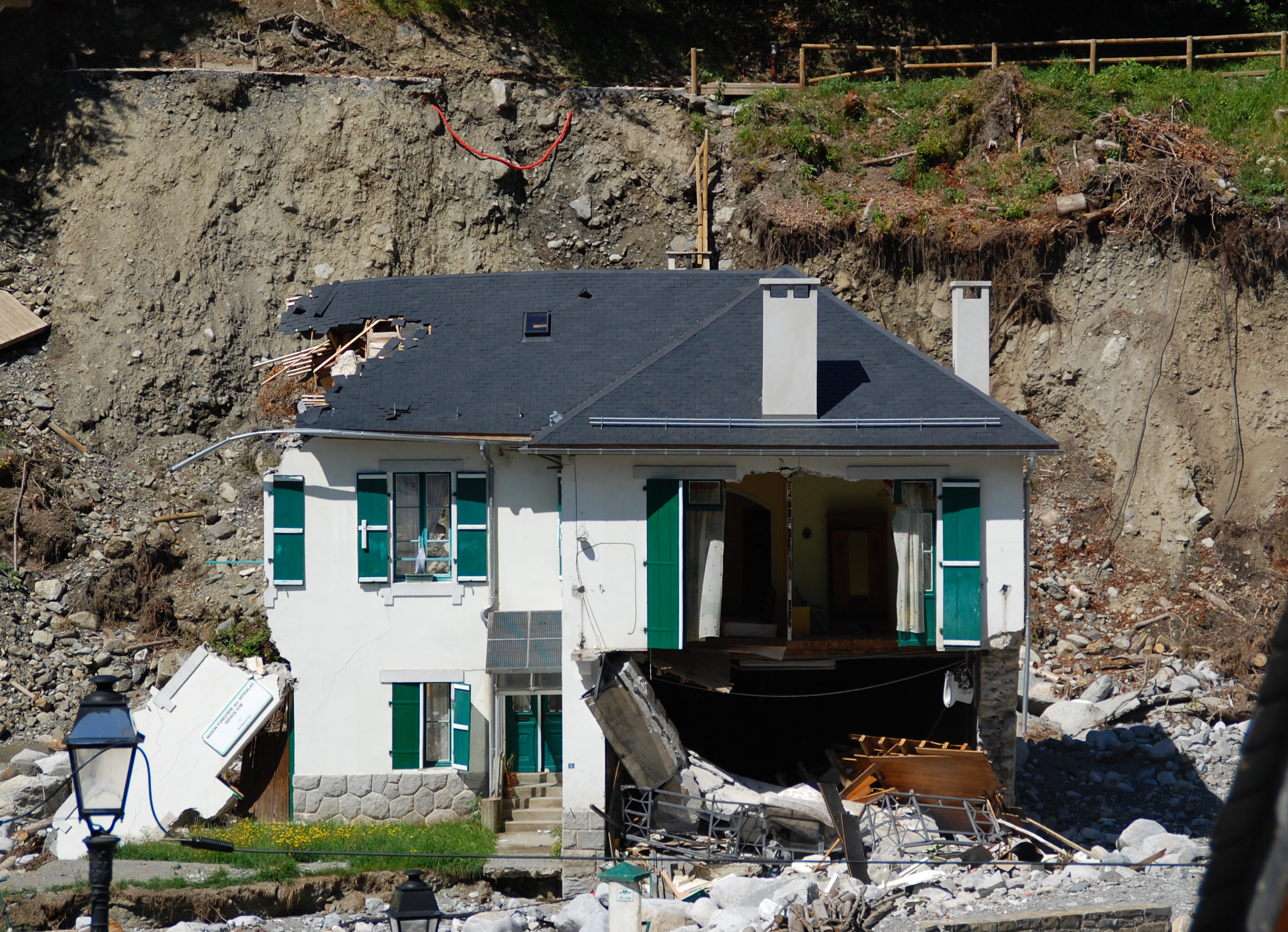 Maison détruite par la crue du Bastan de juin 2013.